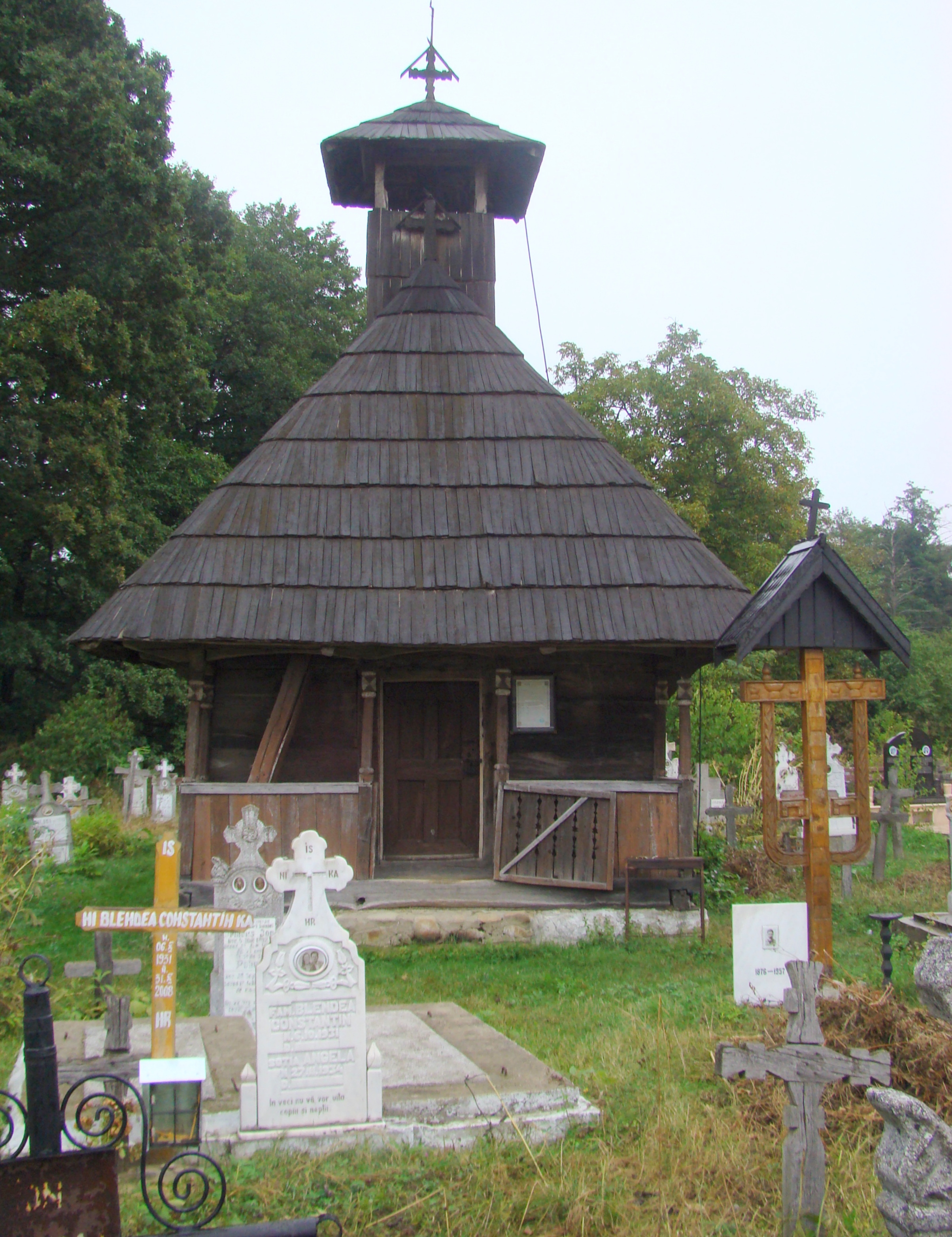 Biserica de lemn monument istoric Hobița-Clăcași județul Gorj